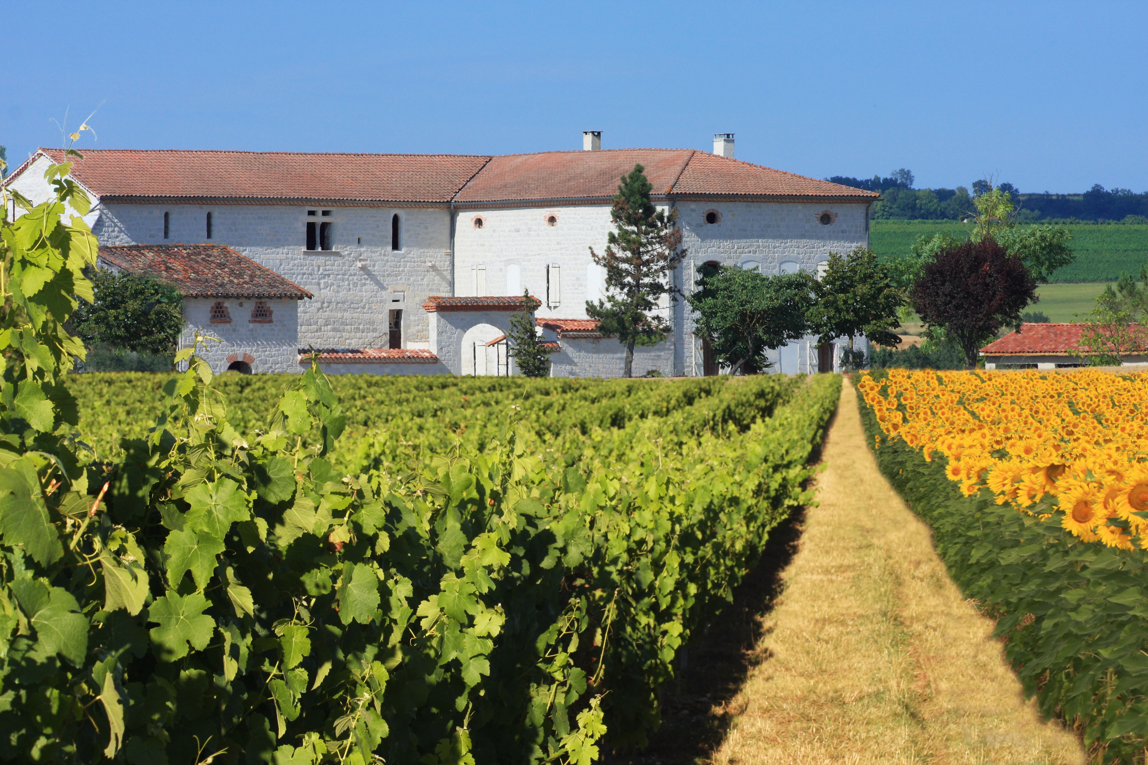 Grange cistercienne de BERNAC (81)